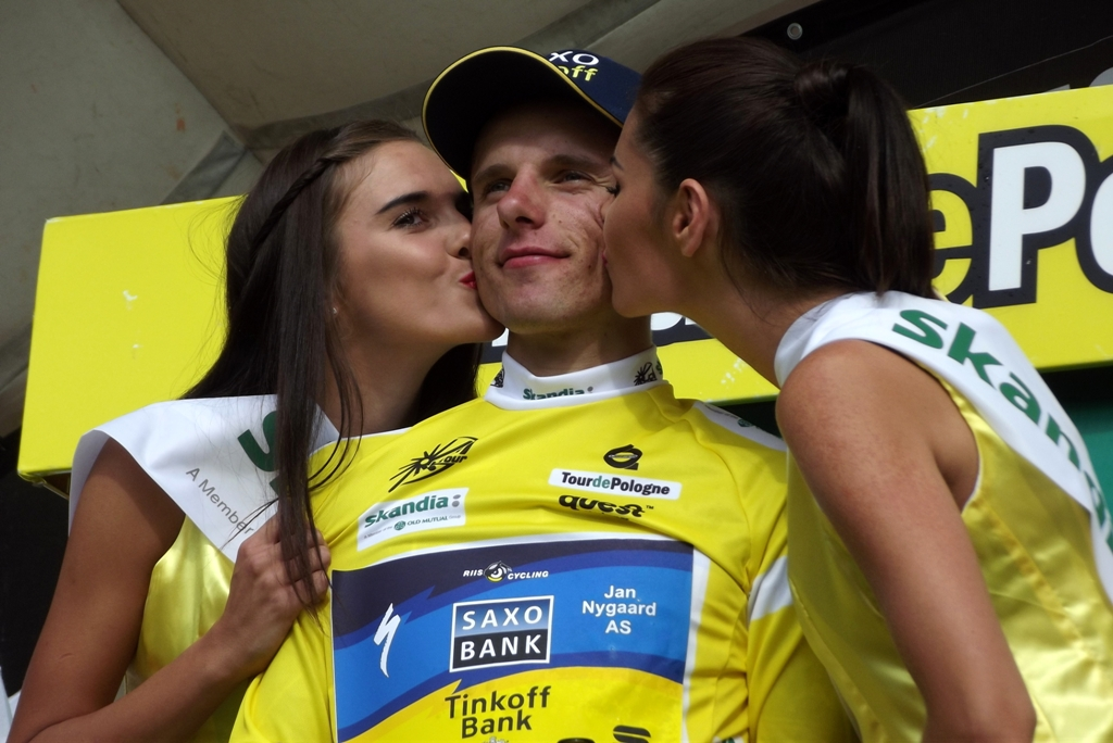 Zdjęcie zrobione podczas IV etapu 70. jubileuszowego Tour de Pologne w Katowicach.